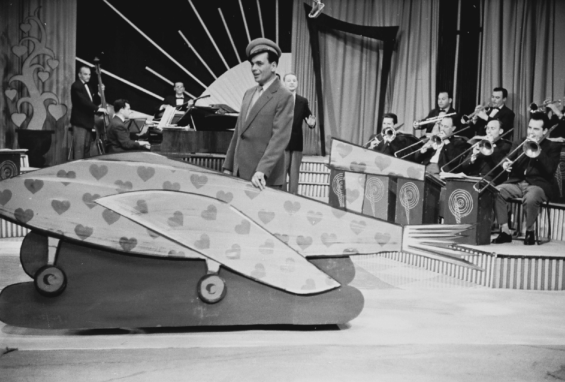 MTV stúdió, Rátonyi Róbert színművész és a Magyar Rádió Tánczenekara, vezényel Zsoldos Imre. Location: Hungary, Budapest V. Tags: Hungarian TV, Budapest, actor, man, scene, band, conductor, driving cap Title: MTV stúdió, Rátonyi Róbert színművész és a Magyar Rádió Tánczenekara, vezényel Zsoldos Imre.